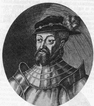 oude prent geen auteursrechten (meer)